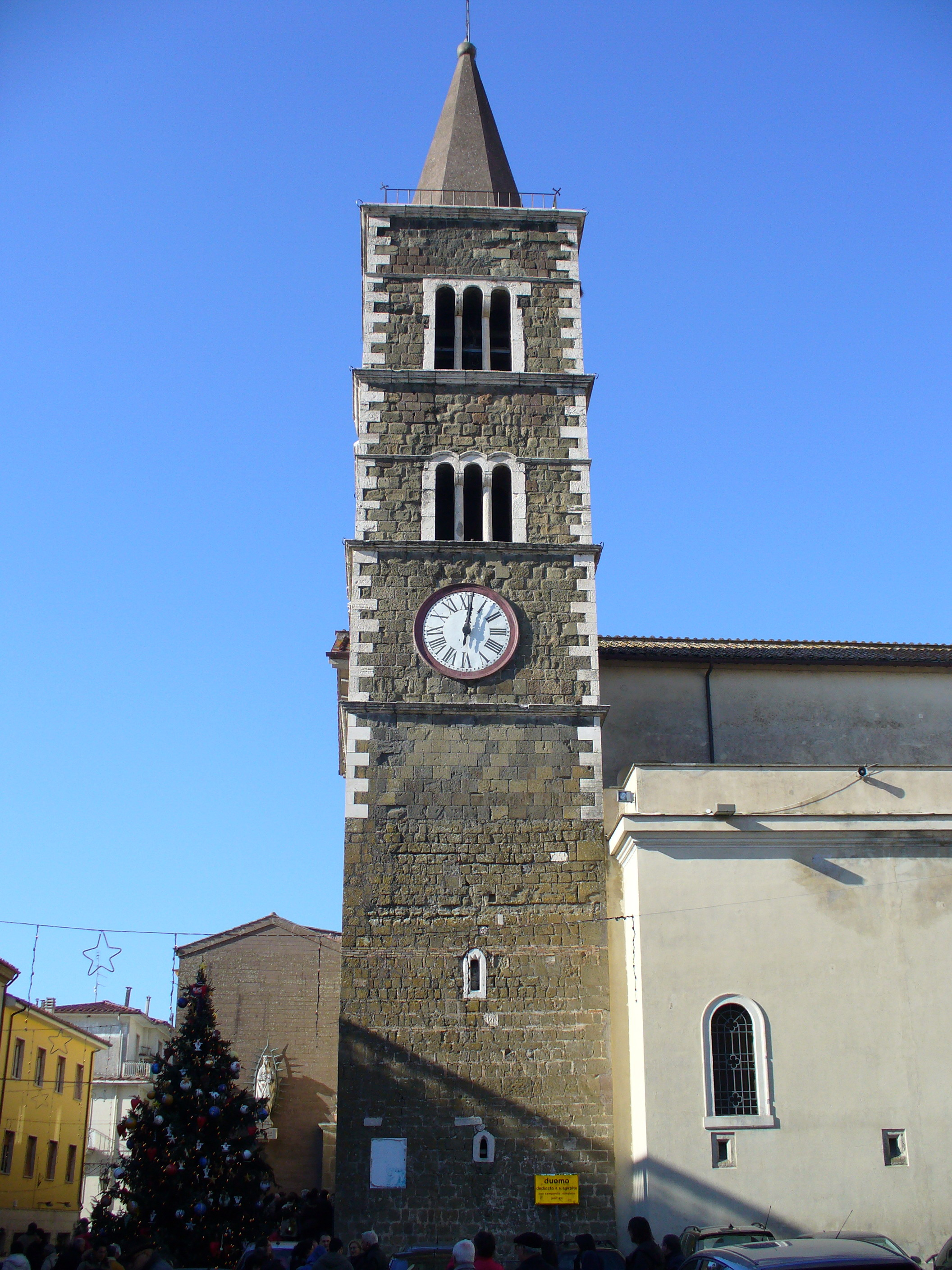 Palestrina (Italy) - Chiesa S.Agapito — Campanile.